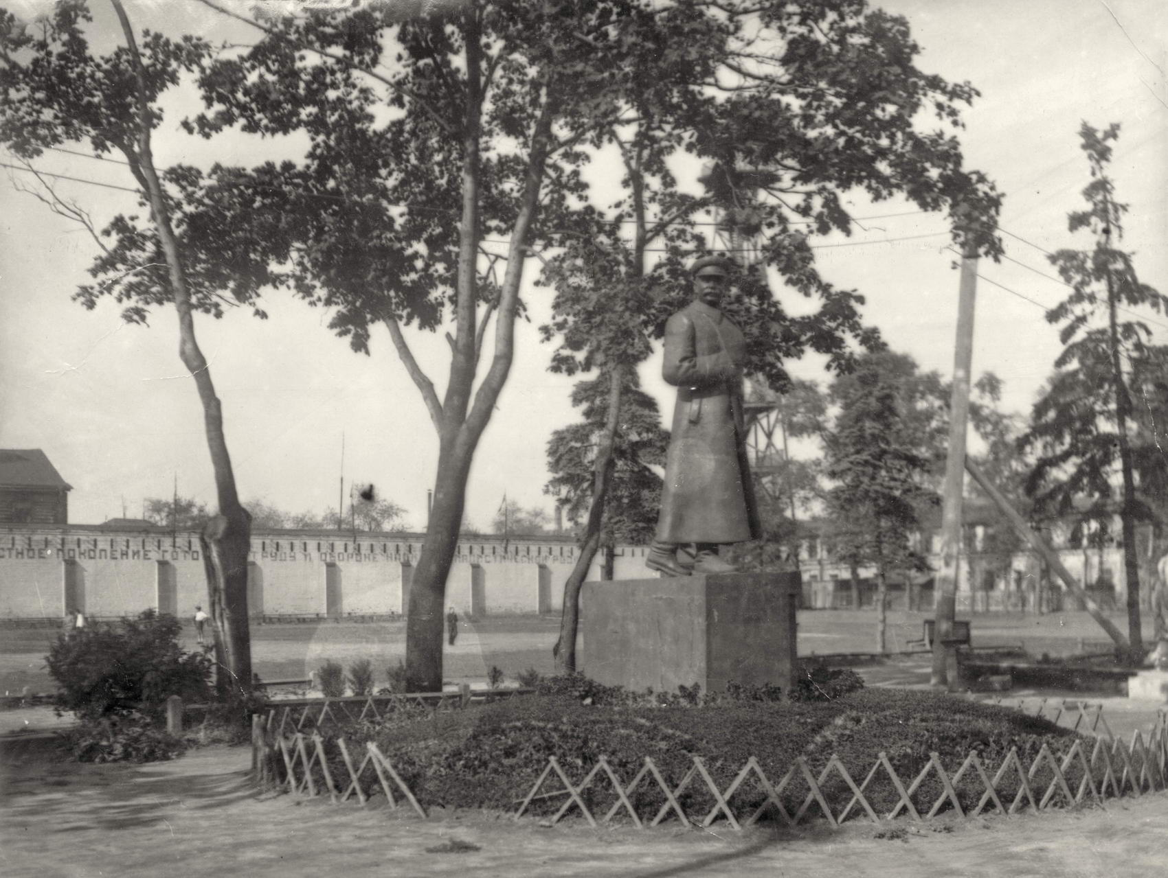 Памятник И. Сталину в Ждановском (Таганском) парке в Москве, 1930-е.